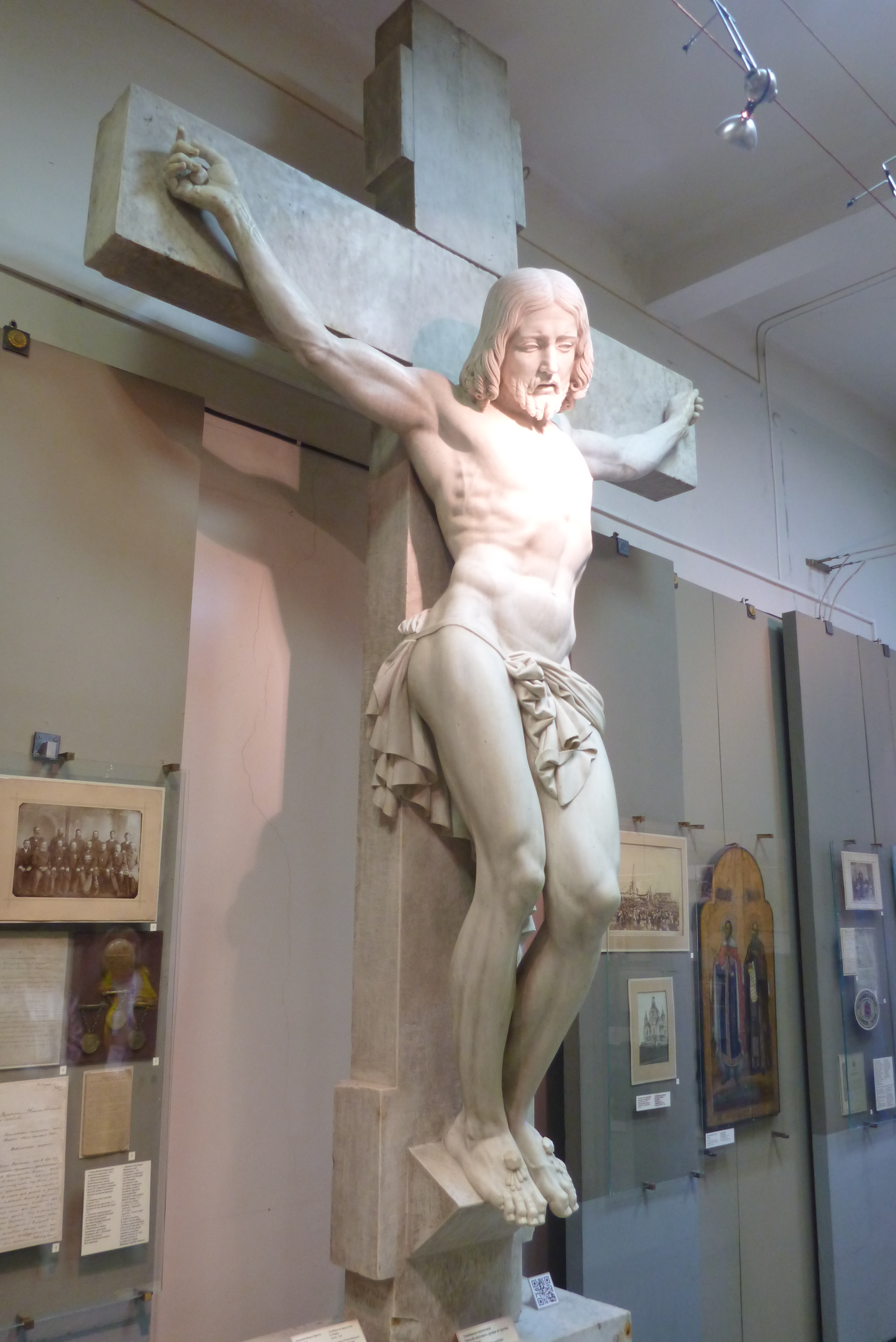 Распятие работы Прадье надгробный памятник из Выйско-Никольской церкви Нижнего Тагила. Выполнено в 1844 году. Хранится в Нижнетагильском музее Горнозаводской Урал